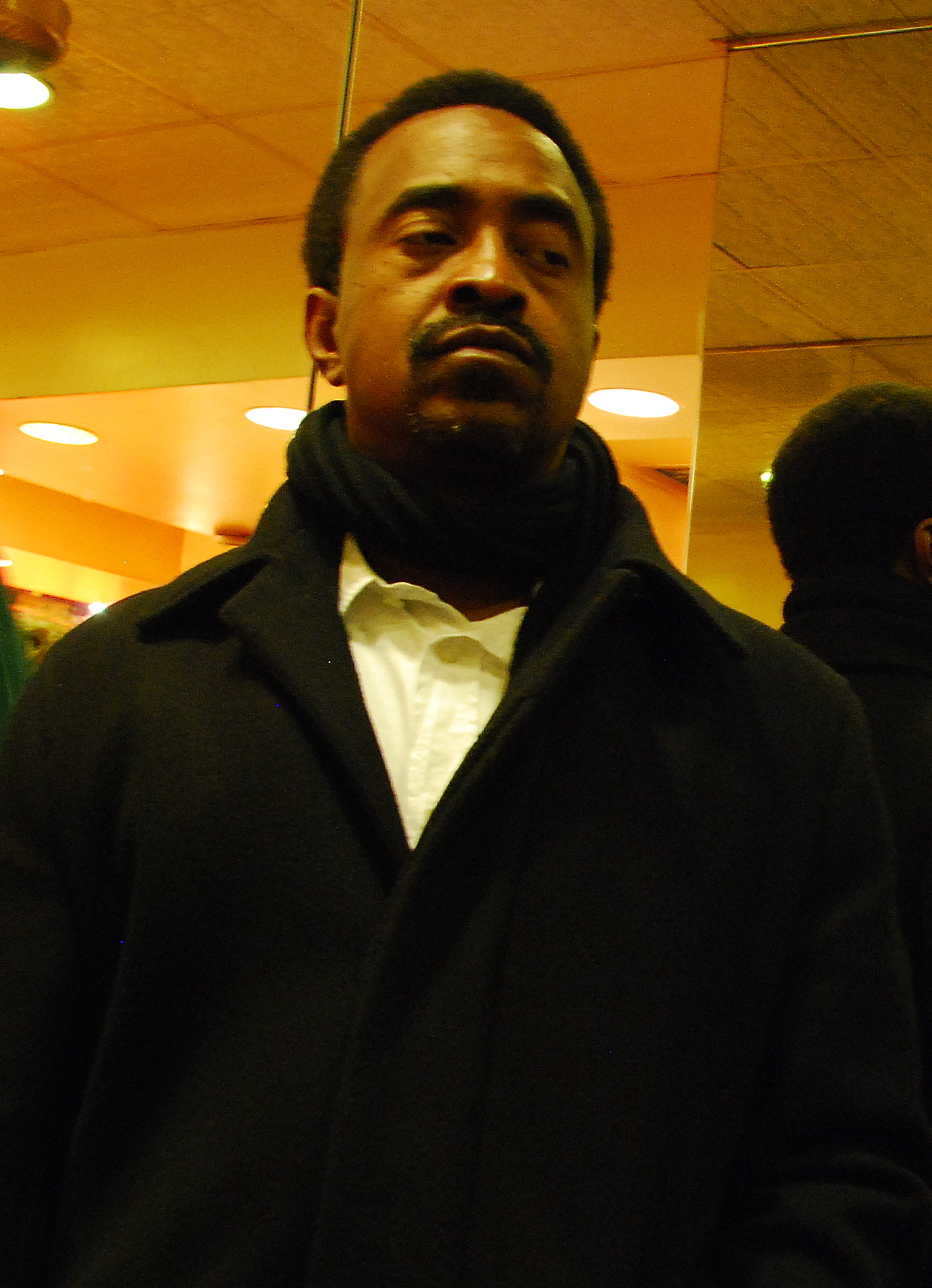 Funnyman Tim Meadows.